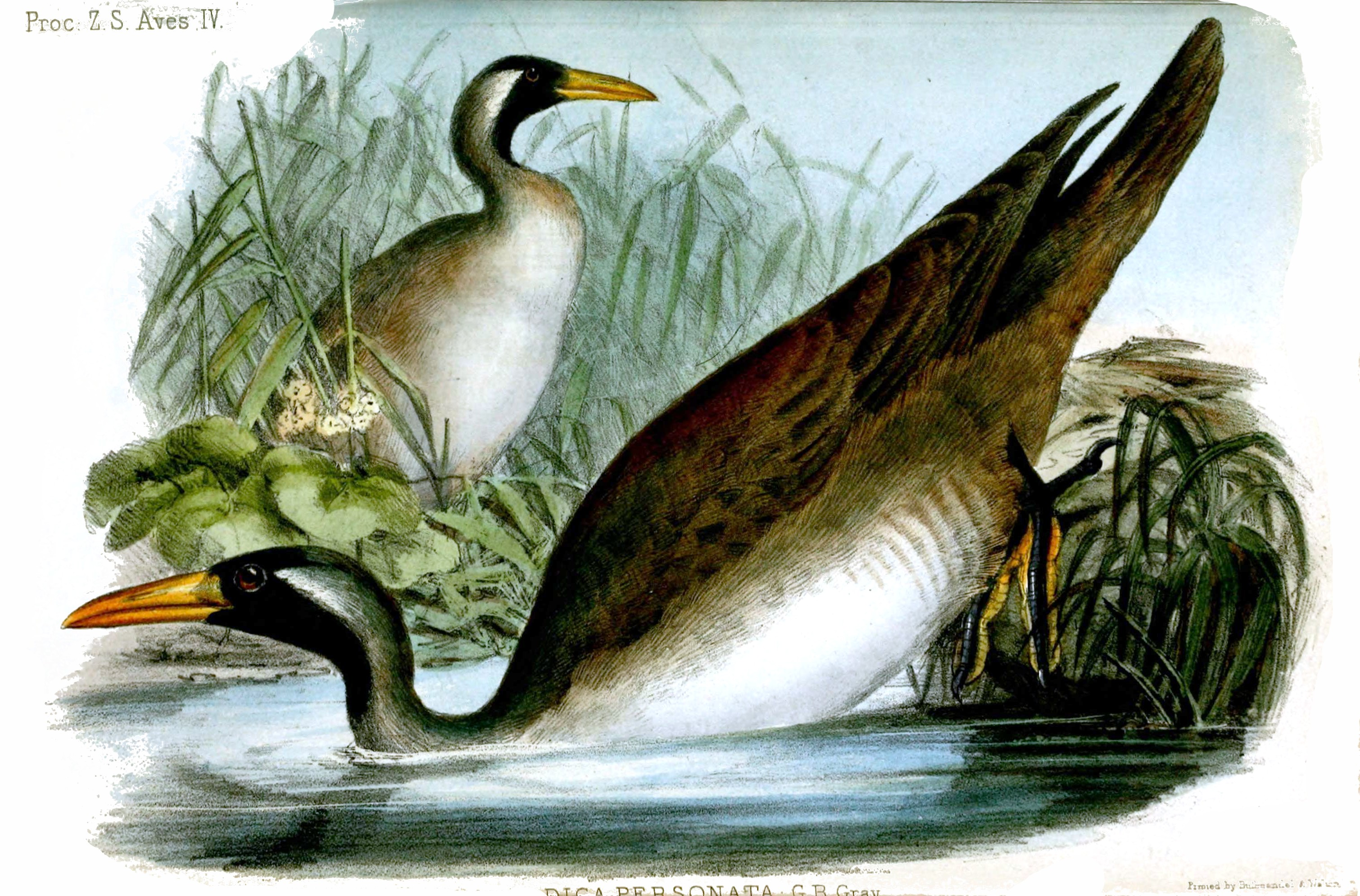 Podica personata = Heliopais personata